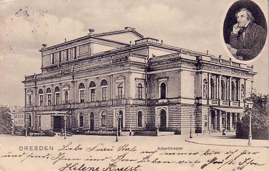 Alberttheater (Neustädter Hoftheater), Dresden